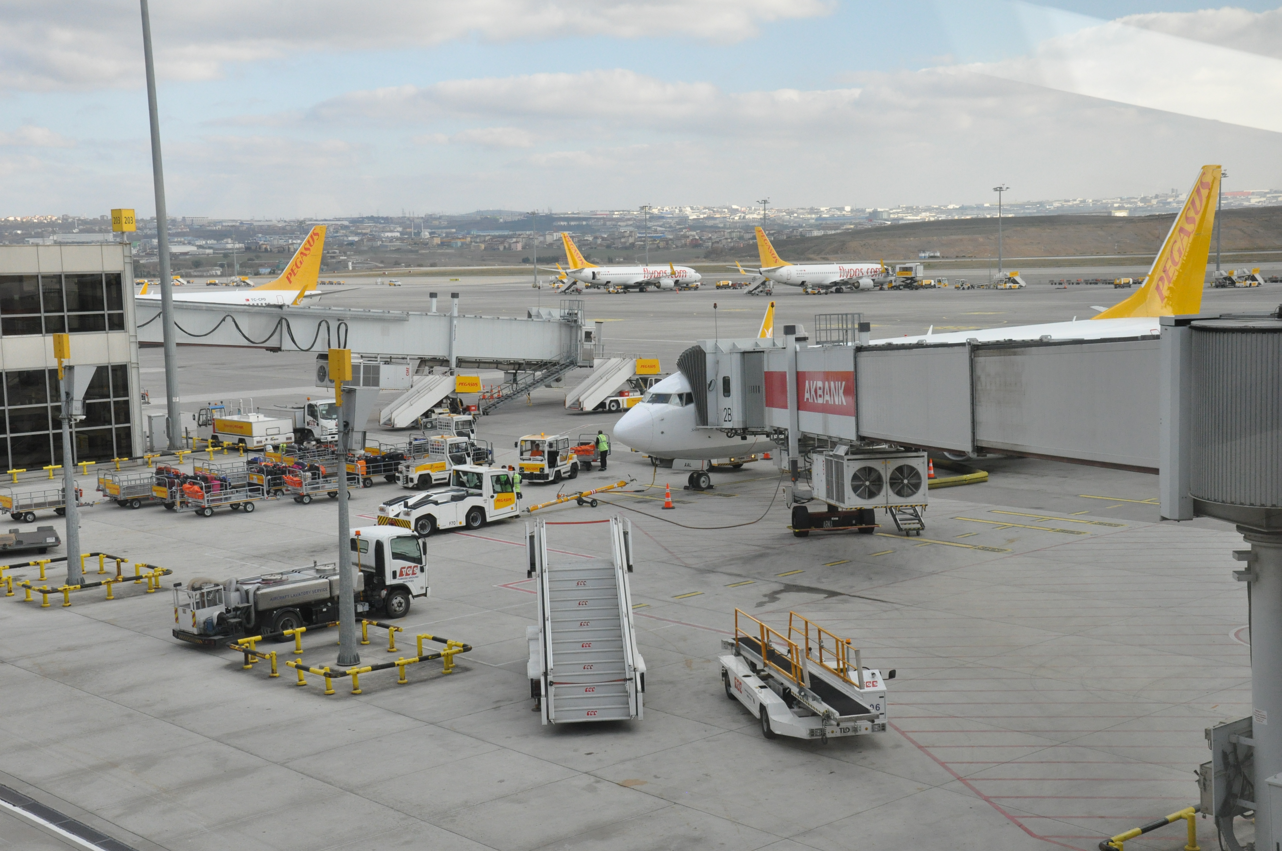 Телетрапи Sabiha Gokcen